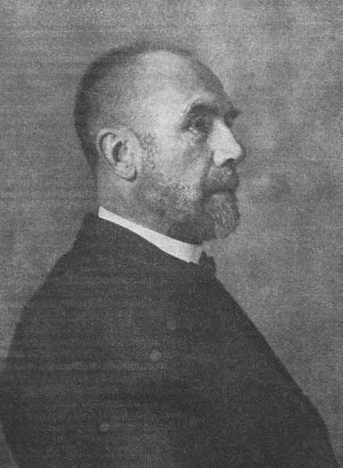 Georg Moog, deutscher alt-katholisher Bischof (1912 bis 1934)